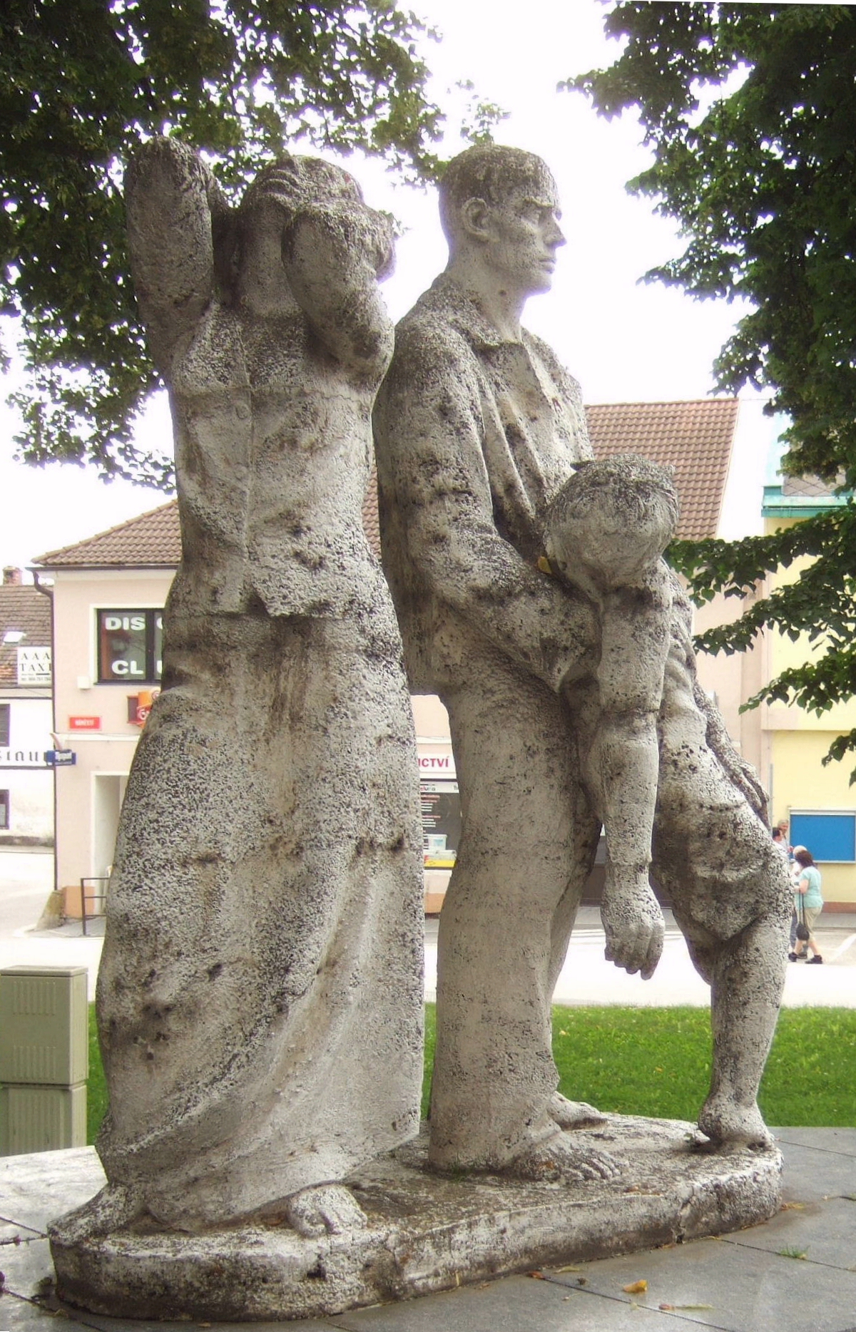 Horní Planá: „Mahnmal zur Erinnerung an den Todesmarsch 1945“ (2009)